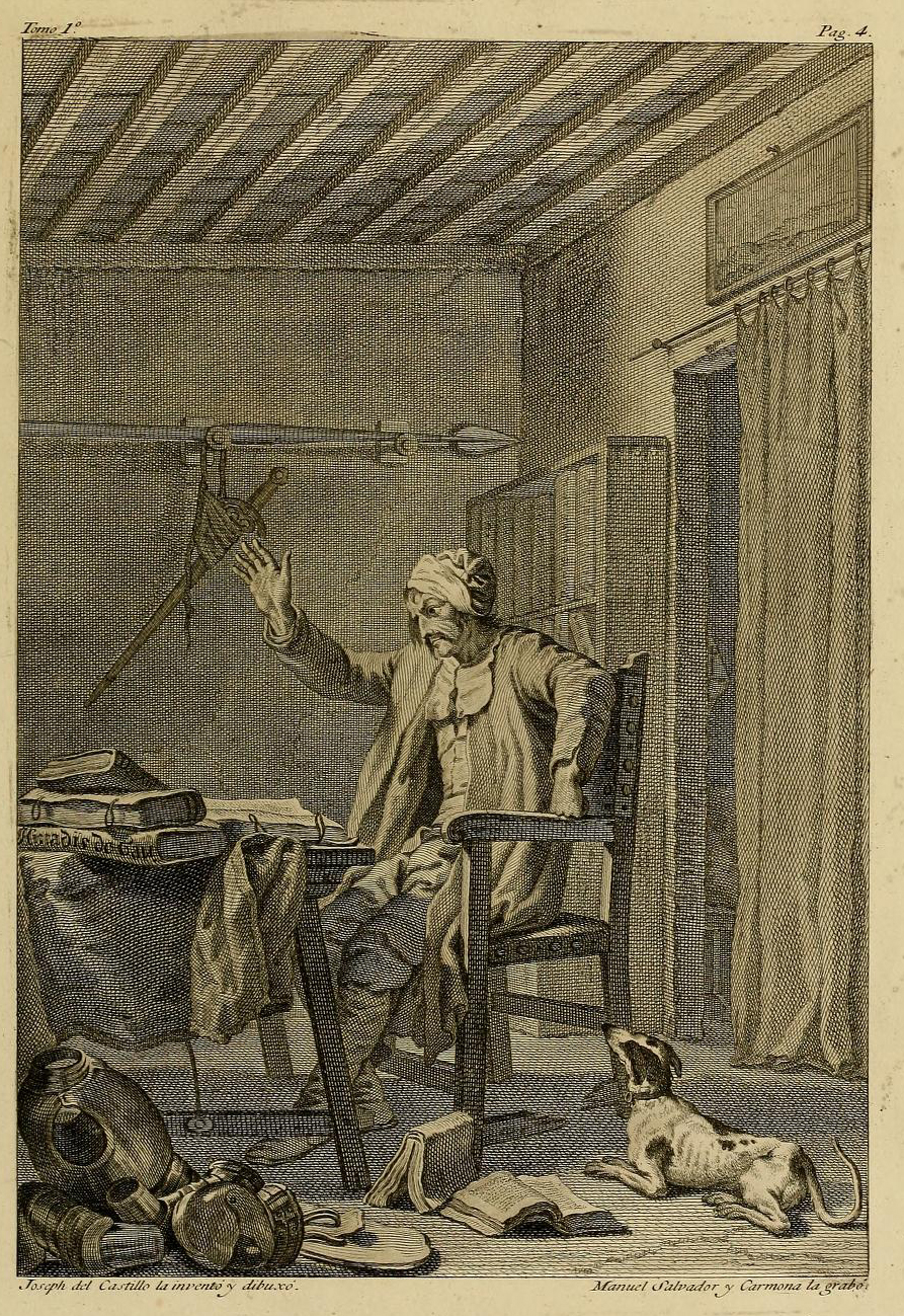 “El Ingenioso hidalgo don Quijote de la Mancha”, ed. Ibarra, Madrid, 1780. p. 4, La Bibilioteca de Don Quijote, grabado por Manuel Salvador Carmona sobre dibujo de José del Castillo.